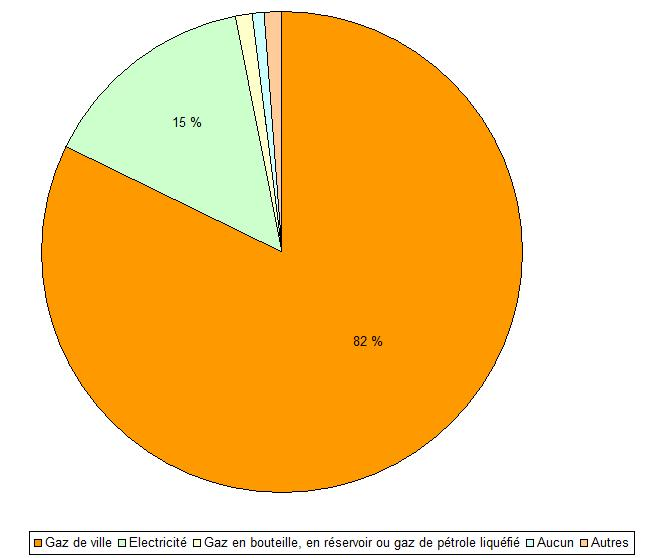 Energies utilisées pour le chauffage domestique, à Hartford (Michigan, Etats-Unis).